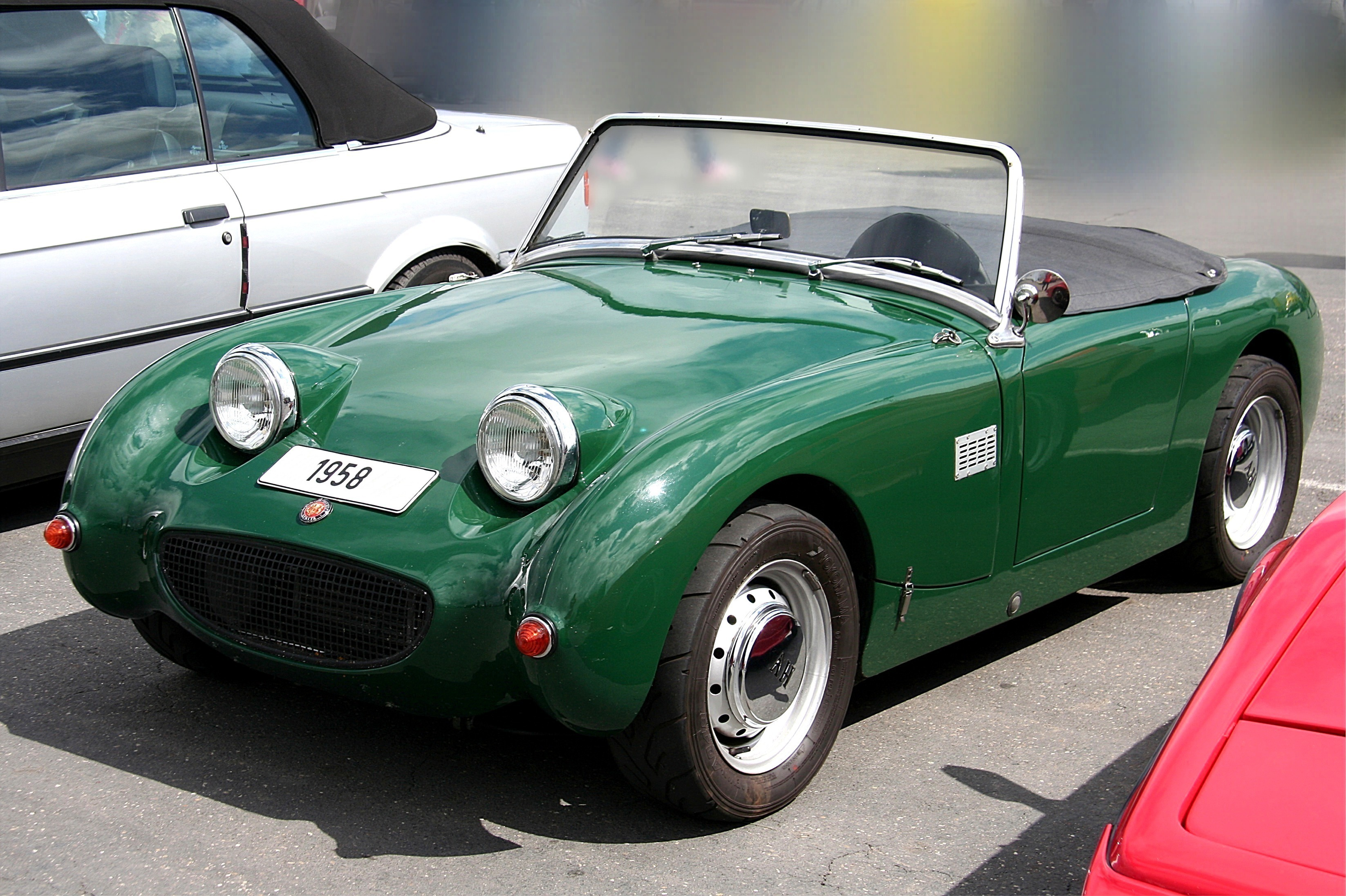 Austin-Healey Sprite Mk 1 - Froschauge